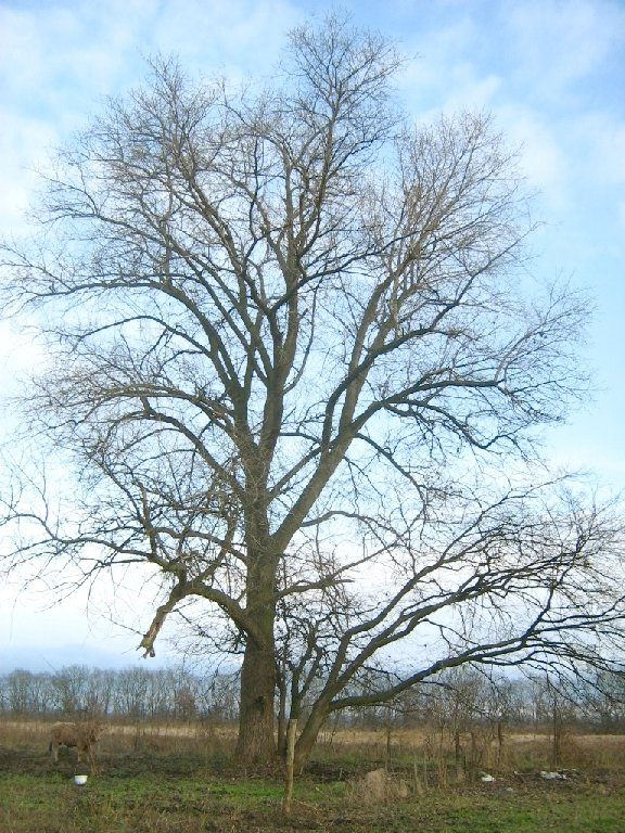 Havelländisches Luch, solitäre Pappel, die äußerlich alle Merkmale einer echten Schwarzpappel (Populus nigra) aufweist